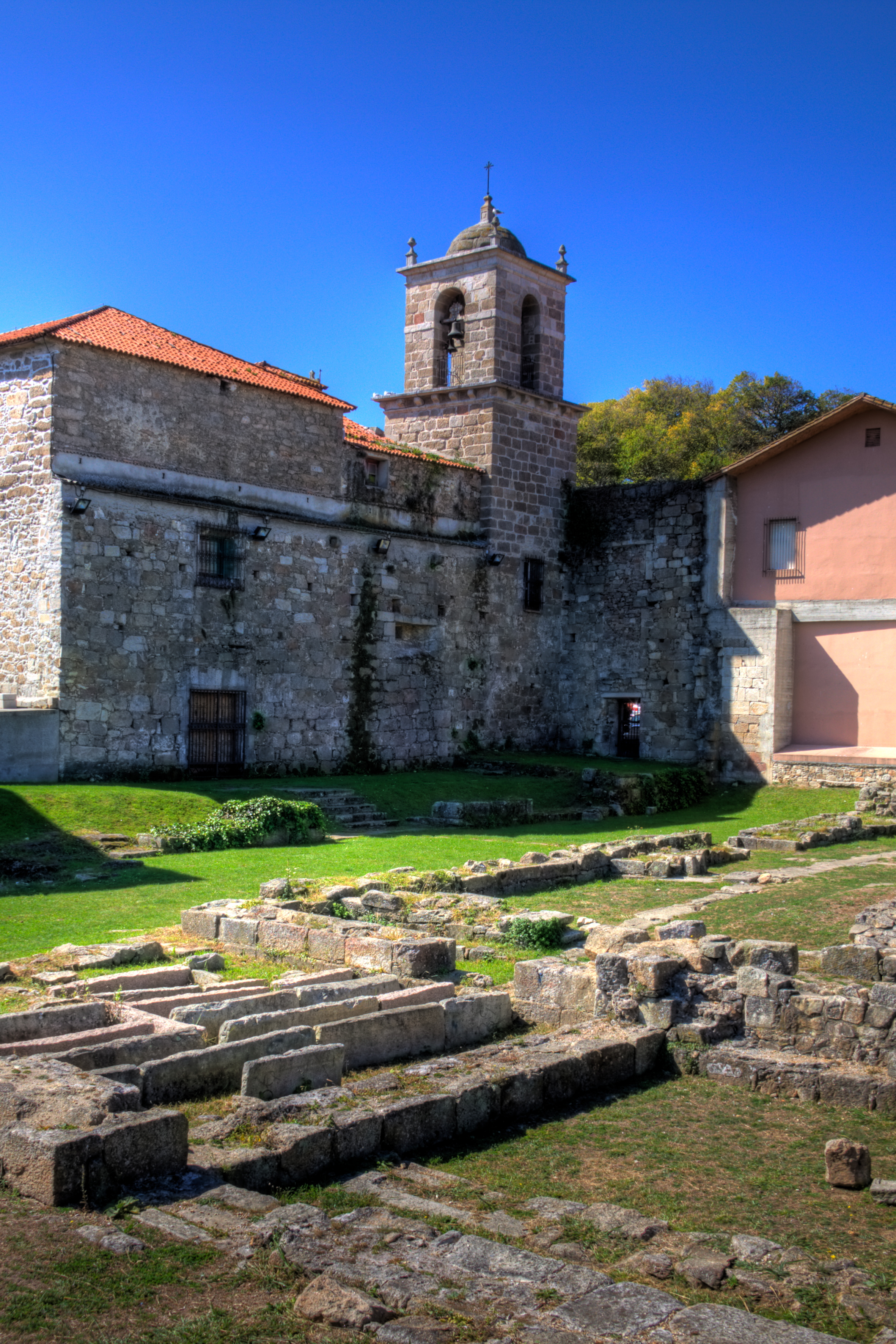 A Coruña - Ruinas de la Iglesia del Ex-convento de San Francisco